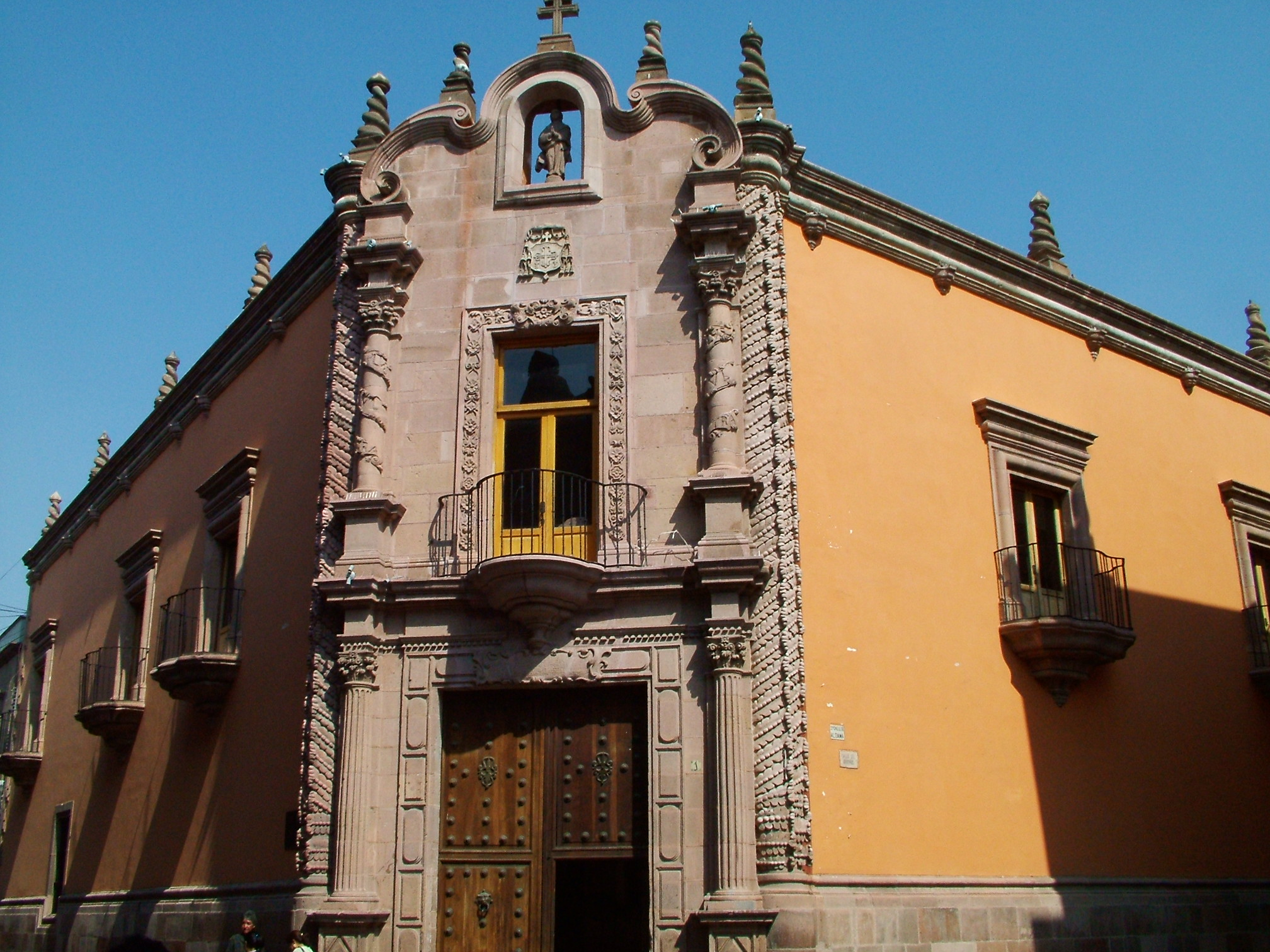 Vista del Pancoupe del antiguo edificio de la caja real en SLP.